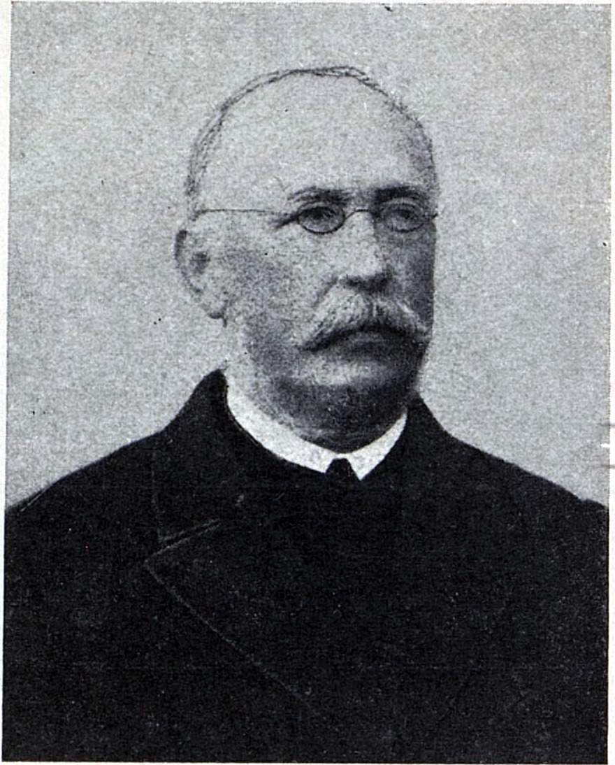 «Michael Sundt Tuchsen Christensen», i Hjalmar Christensen: Skeid (yttre). Bergen, 1922, s. 48. Michael Christensen var far til forfatteren Hjalmar Christensen.